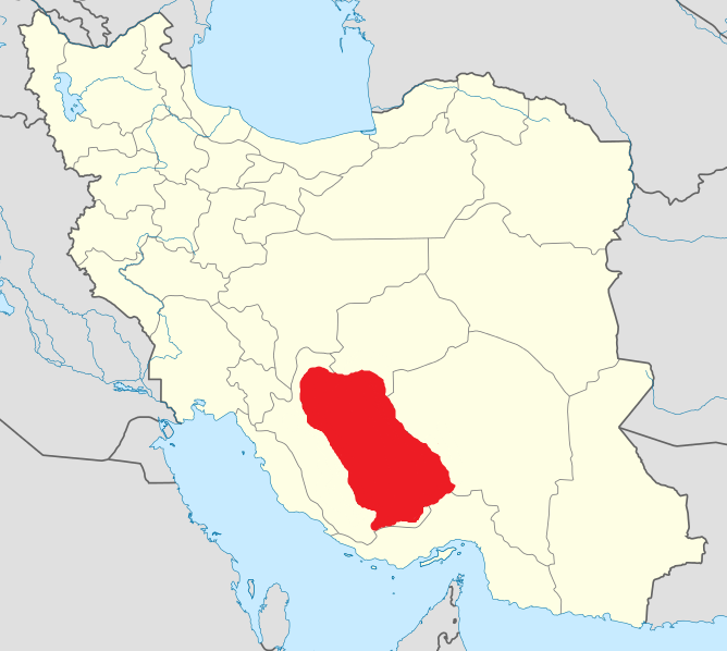 نقشه کوچ ایلات خمسه منبع:کتاب وقایع ایلات خمسه